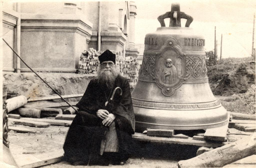 Епископ Димитрий (Вознесенский) в строительной площадке церкви в Харбине, дата съемки неизвестна.